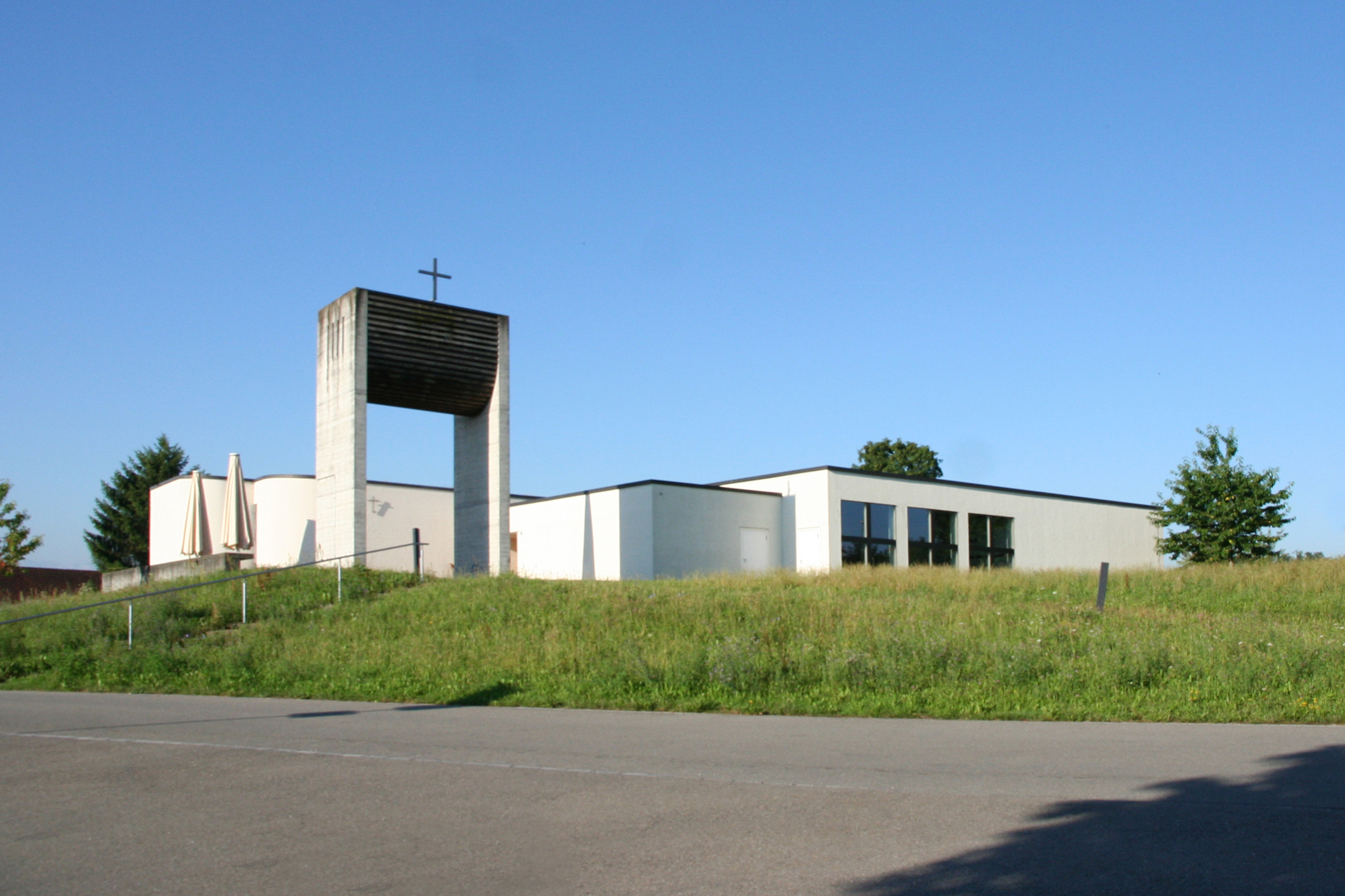 Römisch-katholische Pfarrkirche St. Burkard Mettmenstetten ZH